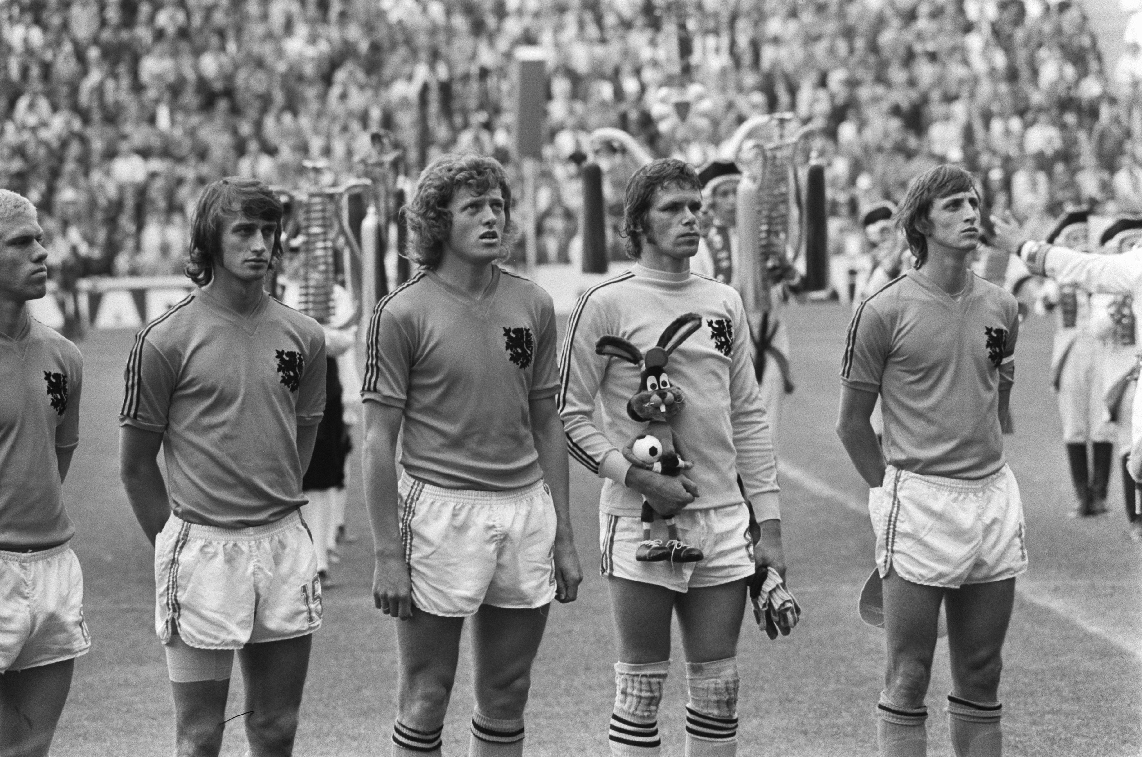 Collectie / Archief : Fotocollectie Anefo Reportage / Serie : [ onbekend ] Beschrijving : Finale wereldkampioenschap voetbal 1974 in Munchen, West Duitsland tegen Nederland 2-1; nr. 10 Westduitse elftal tijdens volkslied, nr. 8, 9, 11 Datum : 7 juli 1974 Locatie : München, Nederland, West-Duitsland Trefwoorden : VOLKSLIEDEREN, elftallen, sport, voetbal, wereldkampioenschappen Fotograaf : Verhoeff, Bert / Anefo Auteursrechthebbende : Nationaal Archief Materiaalsoort : Negatief (zwart/wit) Nummer archiefinventaris : bekijk toegang 2.24.01.05 Bestanddeelnummer : 927-3110